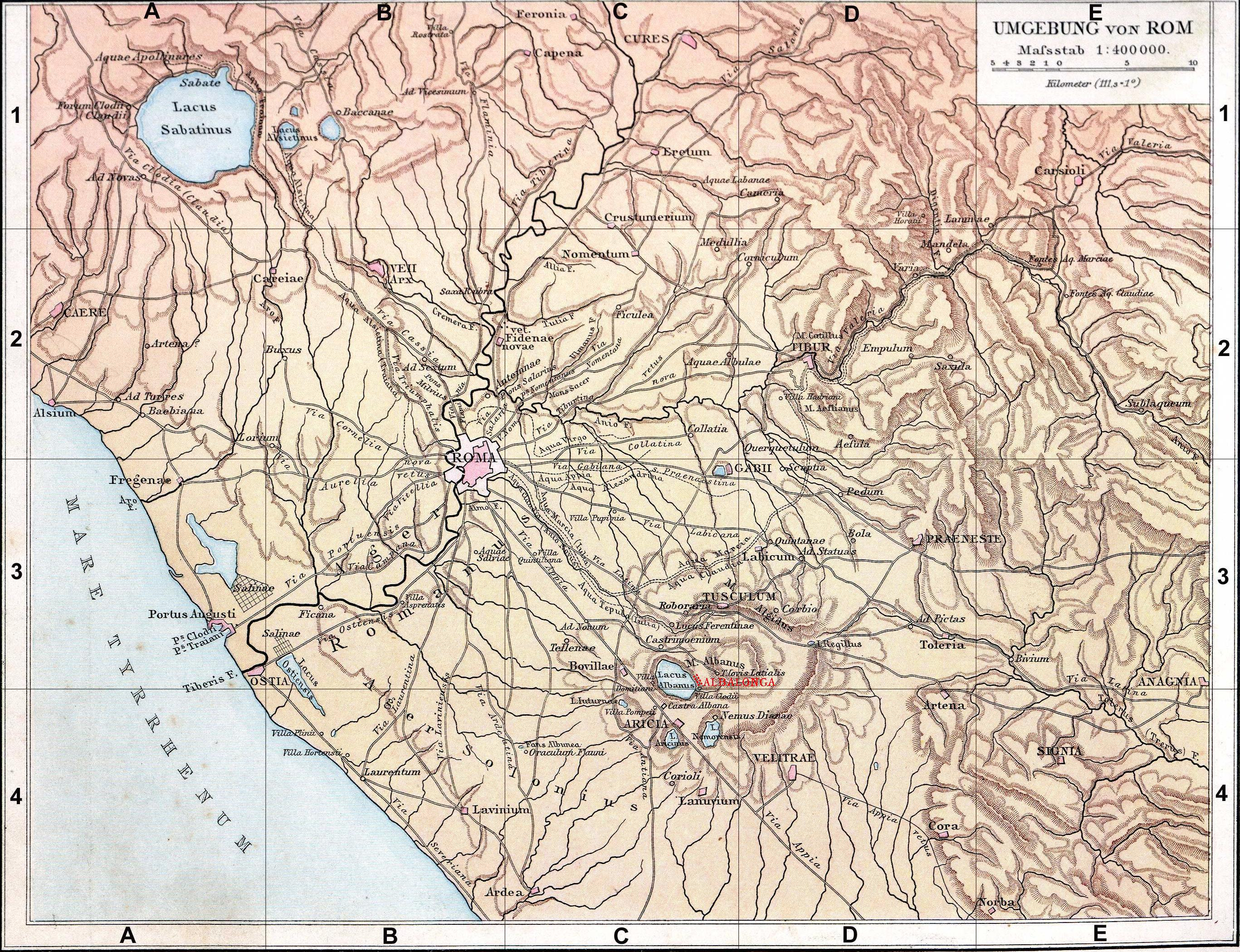 Fond de carte de 1886 (G. Droysens Allgemeiner Historischer Handatlas), libre de droit (Image:Rom_Umgebung.jpg), avec Albe-la-Longue en rouge.